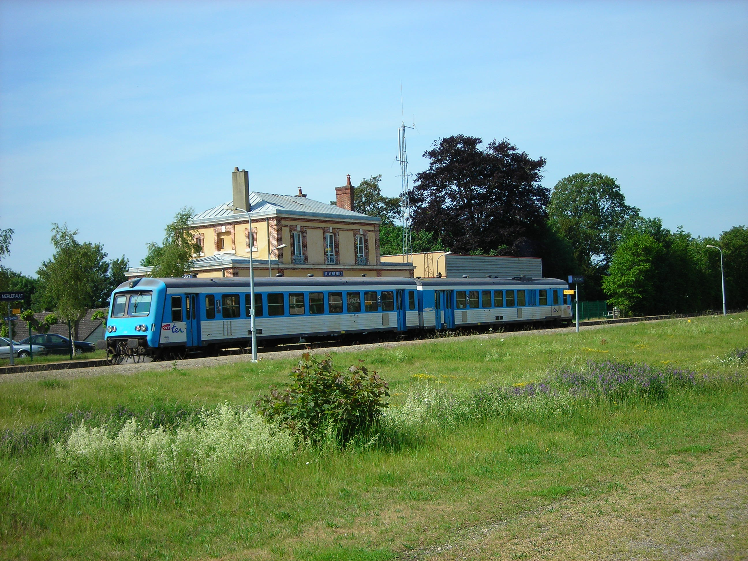 Gare du Merlerault (Orne, France), vue de coté quaie, train TER Basse Normandie.